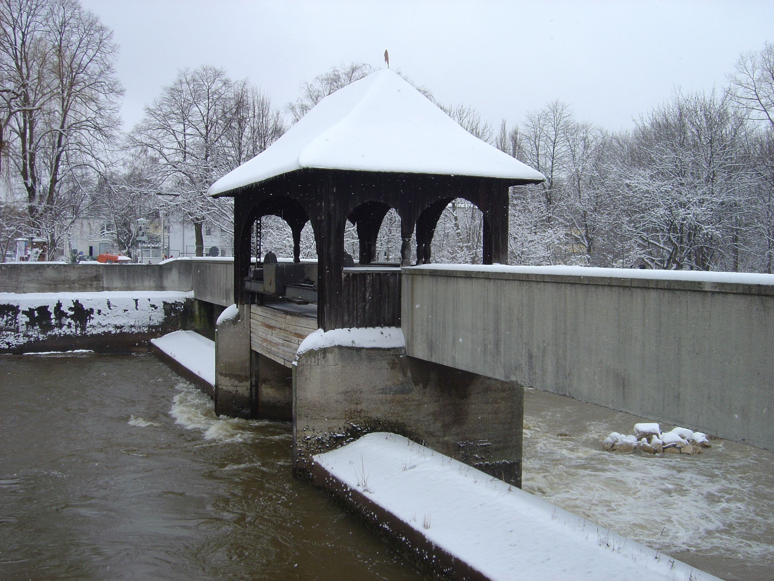 Das ehemalige Goggeleswehr und die Goggelesbrücke über die Wertach in Augsburg, im Winter.